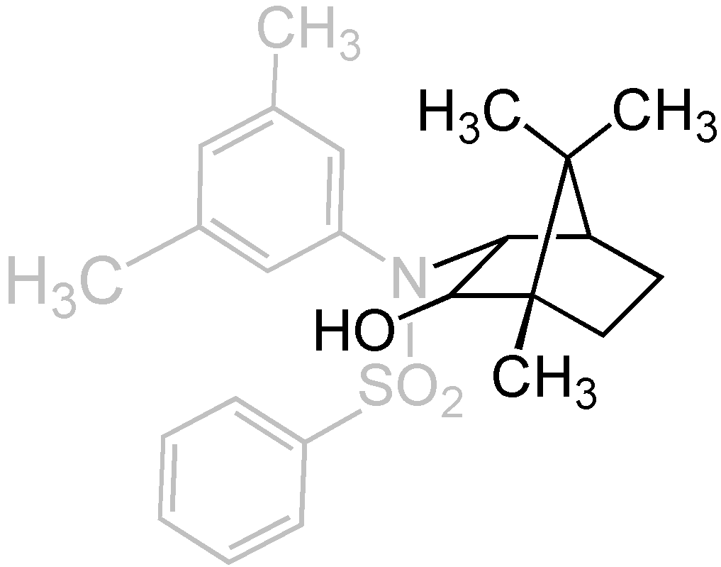 Struktur des Helmchen-Auxiliars